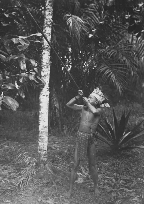 Foto. Dajak met blaasroer